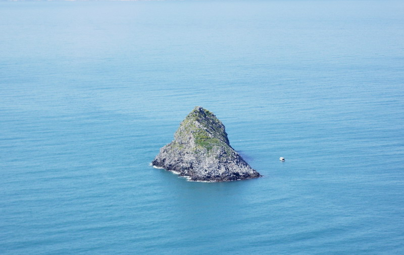 L'Isola Argentarola di fronte alla costa occidentale del Monte Argentario